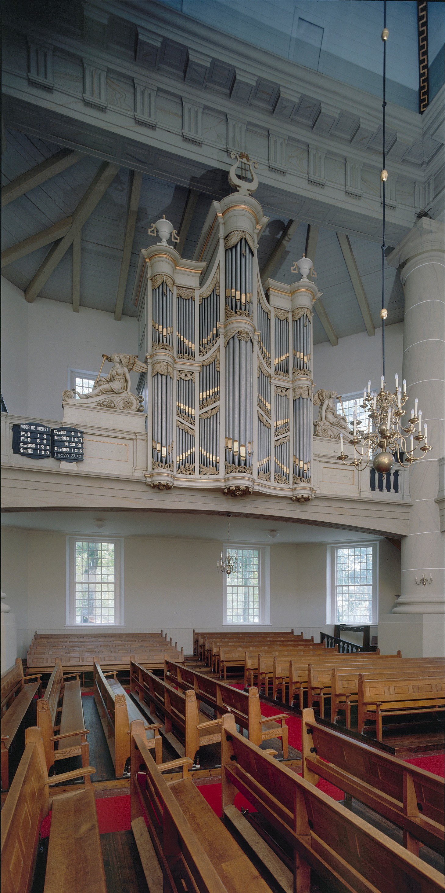 Nederlands Hervormde Kerk: Interieur, aanzicht orgel, orgelnummer 1372 (opmerking: Gefotografeerd voor Het Historische Orgel in Nederland 1840-1849)